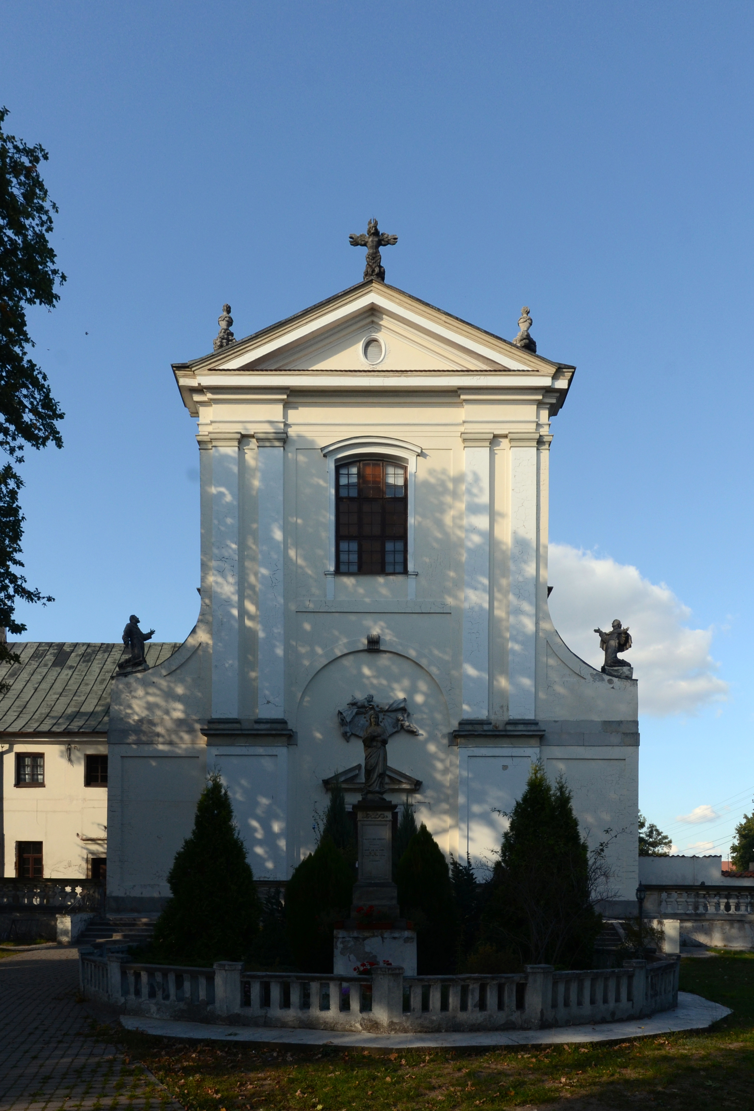 Kościół św. Antoniego i św. Piotra w Węgrowie.